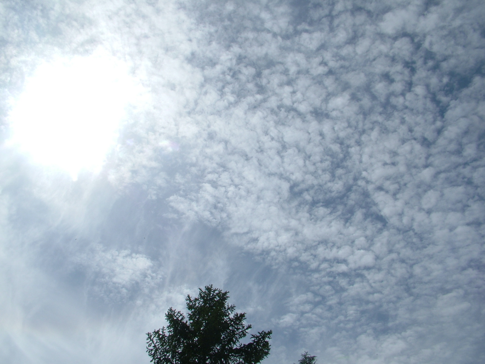 Kiudrünkpilved (Cirrocumulus stratiformis) Tartu kohal